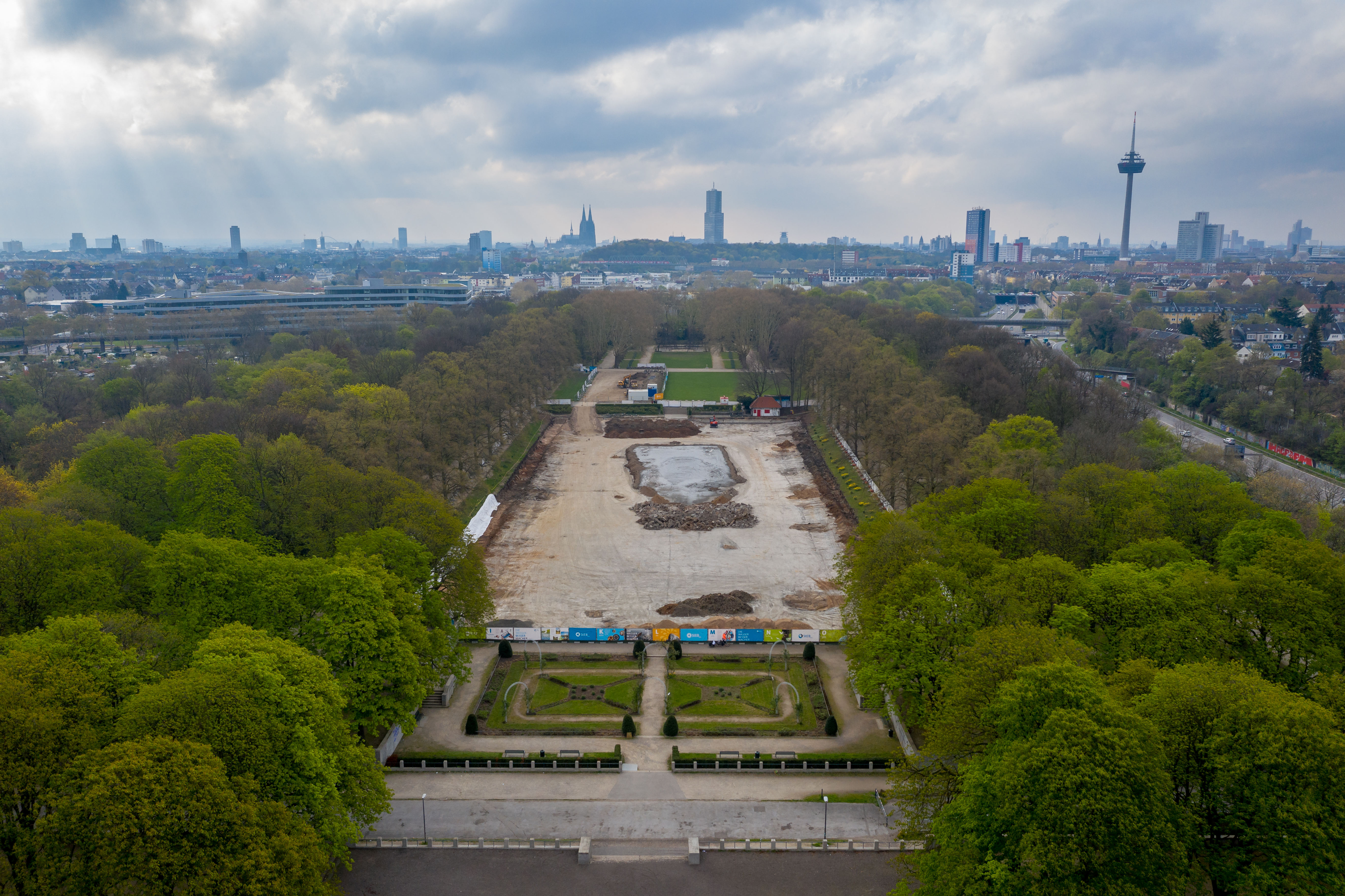 Sanierung des Blücherparkweihers 2019: Trockengelegter Weiher mit Fundamentarbeiten. DFS-Genehmigung BNL 080401/19